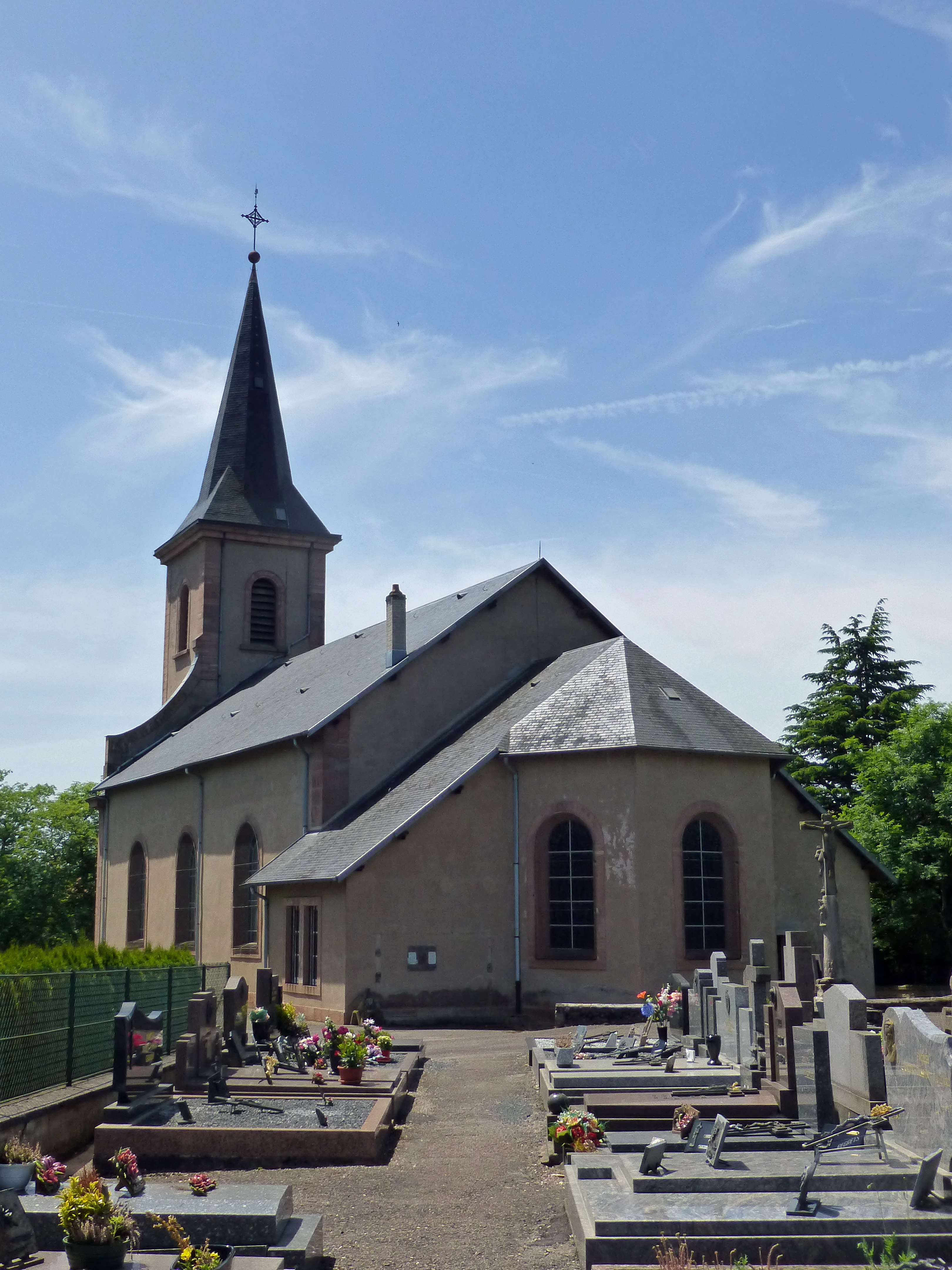 Nompatelize (Vosges) : l'église